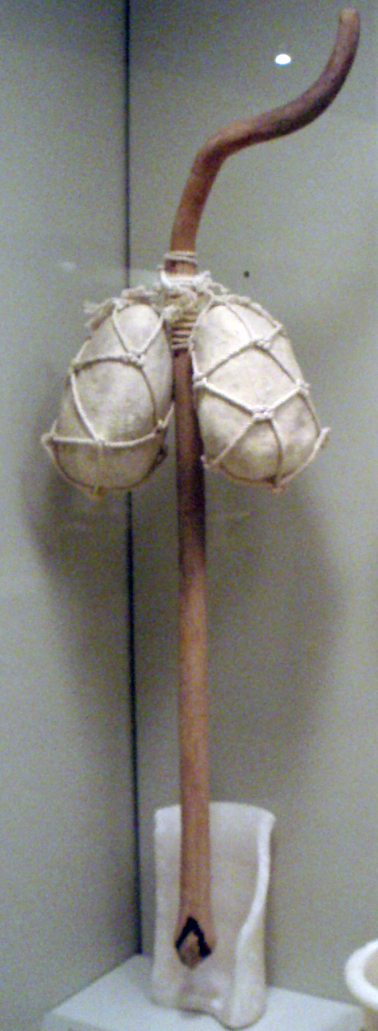 Reproducción de taladradora empleada en el Antiguo Egipto para vaciar el interior de las vasijas pétreas.